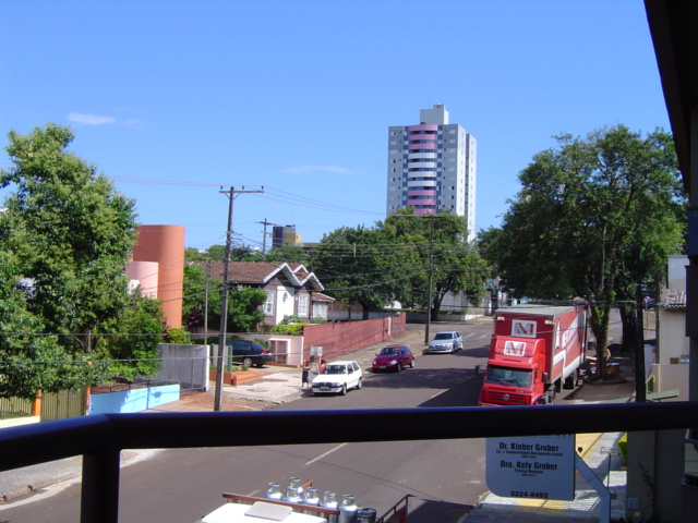 Cascavel, Parana, Brazil. Looking north along Rua Sete de Setembro at Rua Maranhão.